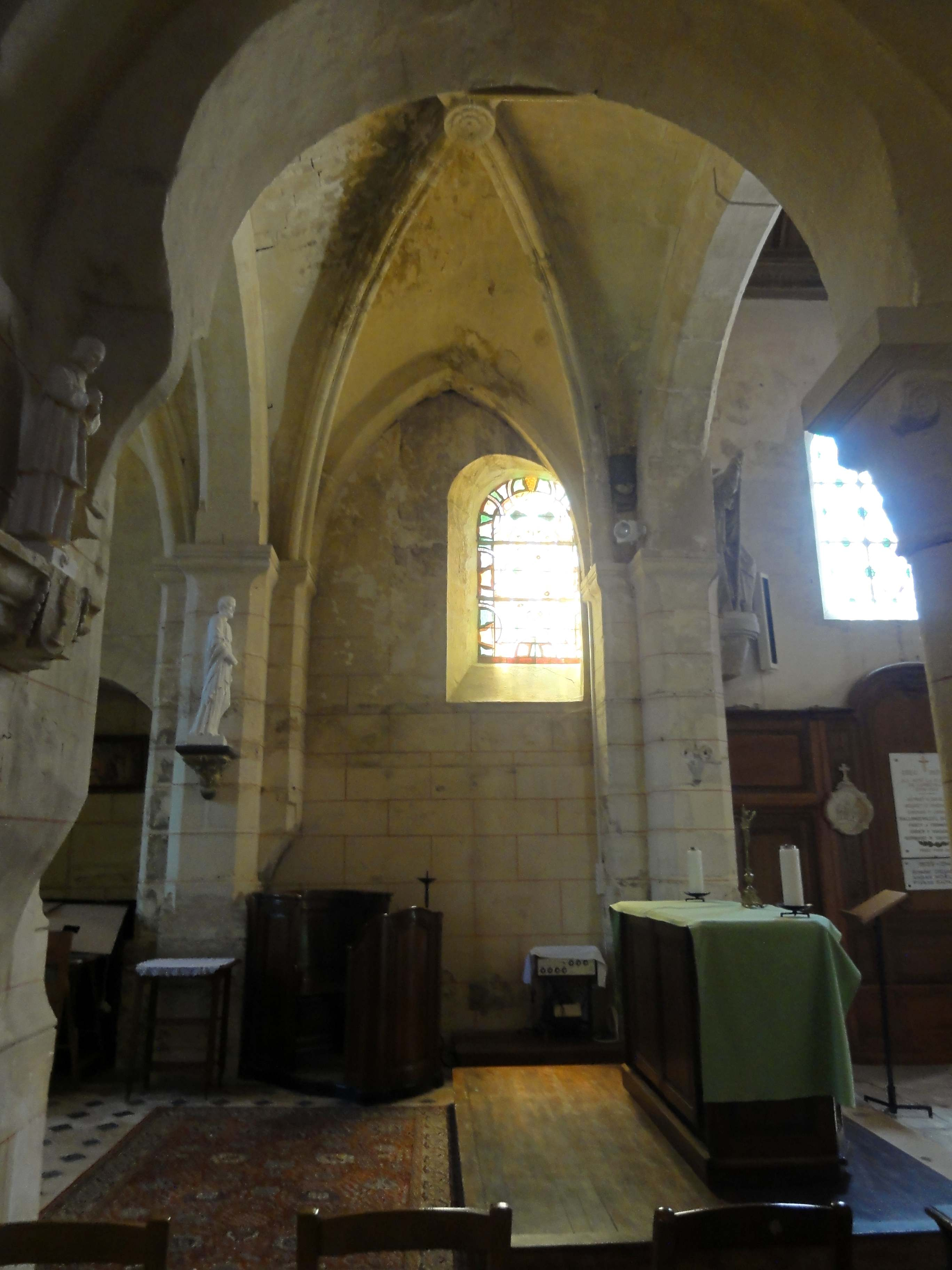 Intérieur de l'église Saint-Martin de Labbeville (voir titre).